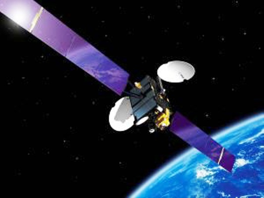 Azərbaycan peyki